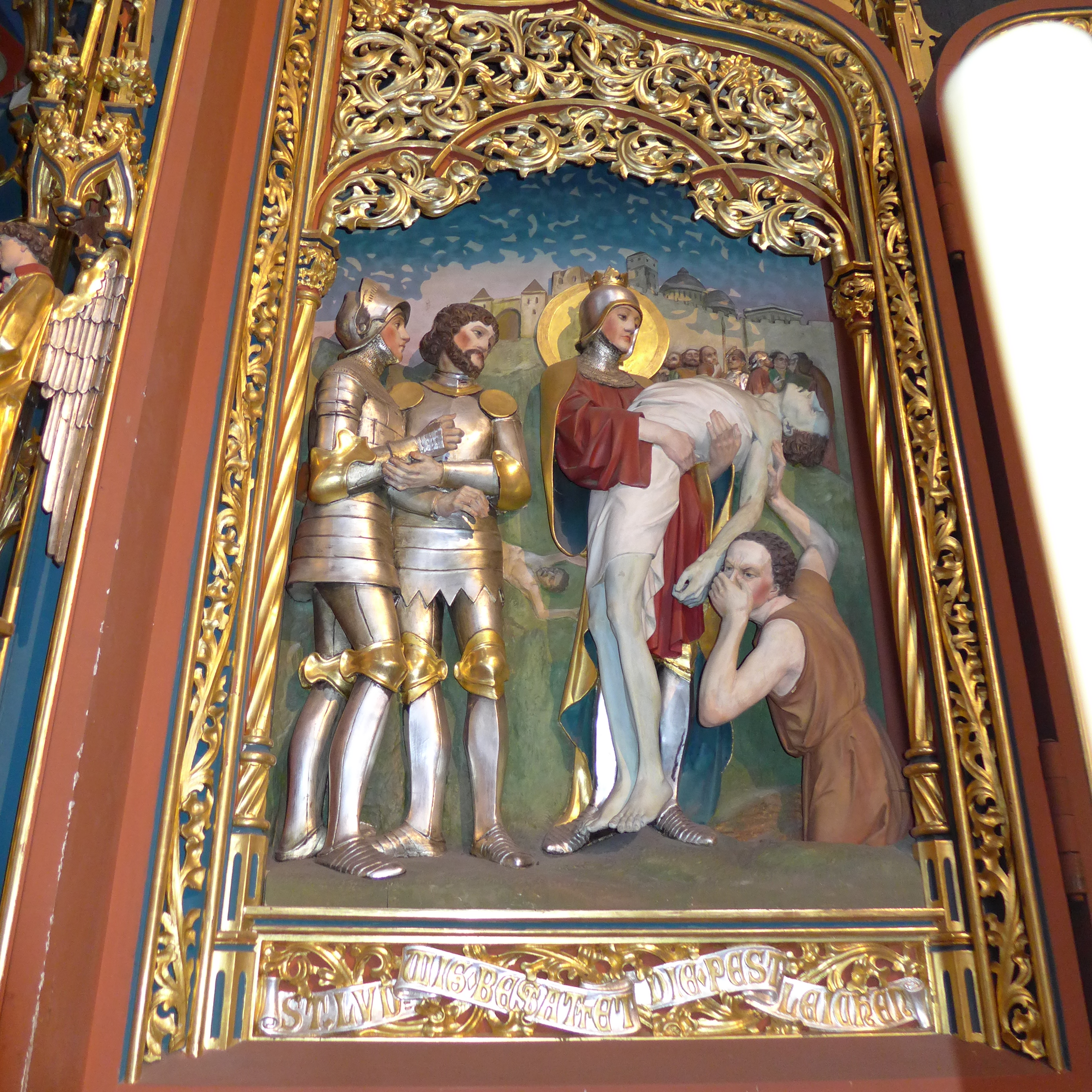 St. Ludwig (Saarlouis), Neogotischer Flügelaltar, Flügelrelief "St. Ludwig bestattet die Pestleichen"